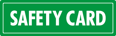 In Deutschland für Fluggesellschaften verpflichtendes Symbol zur Kennzeichnung der Safety Instruction Card